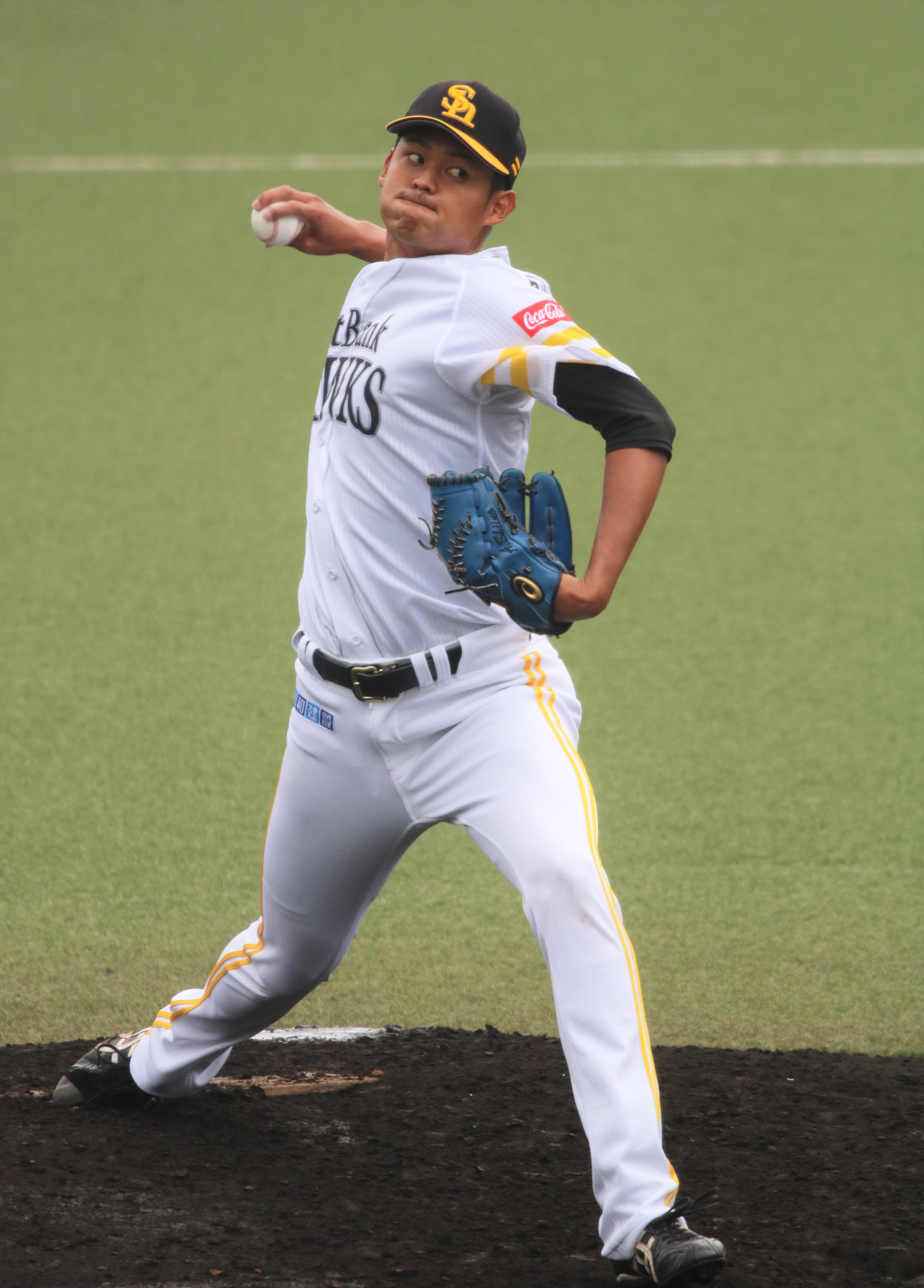 2018年6月6日 ウエスタンリーグ